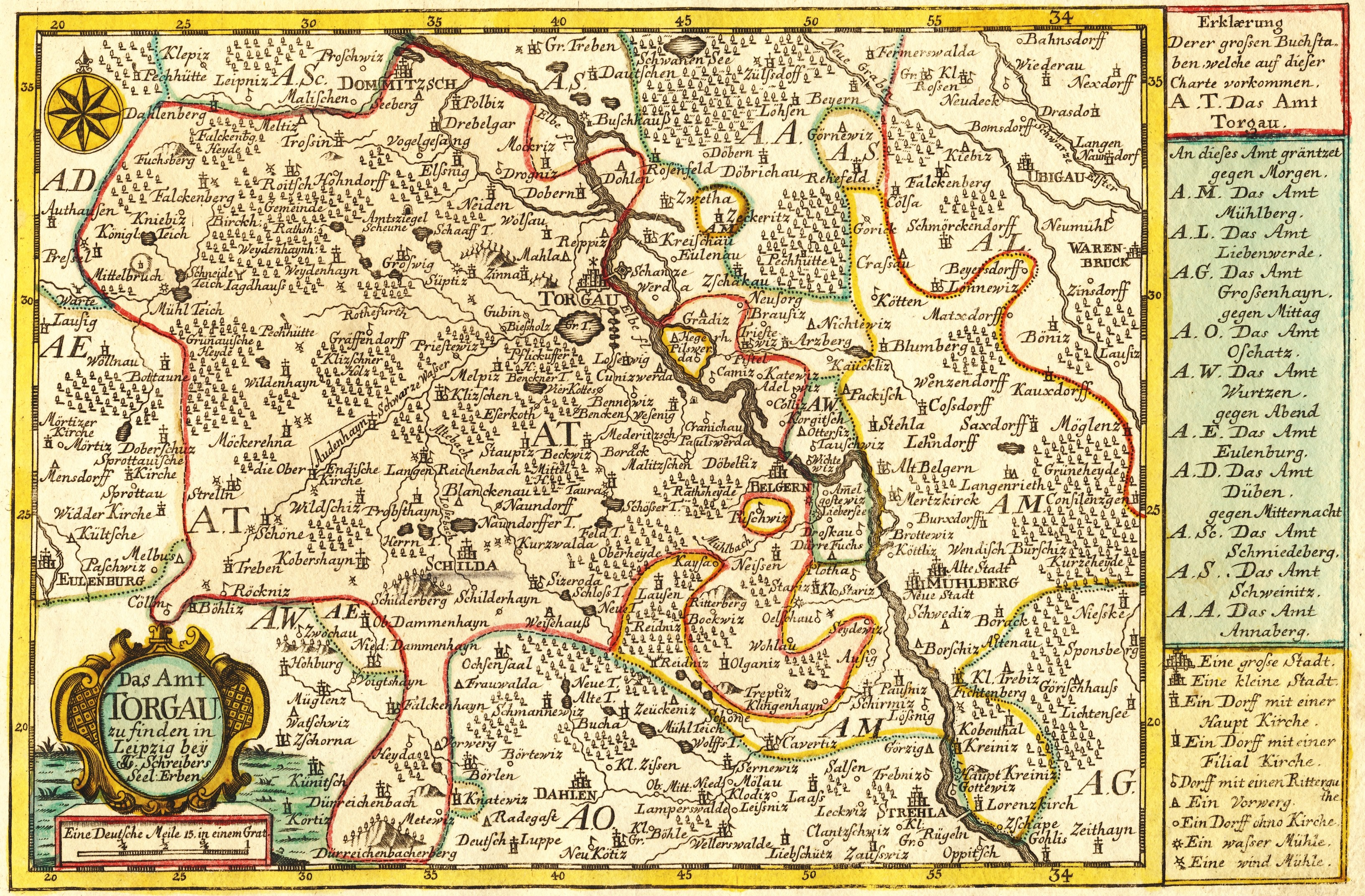 Amt Torgau